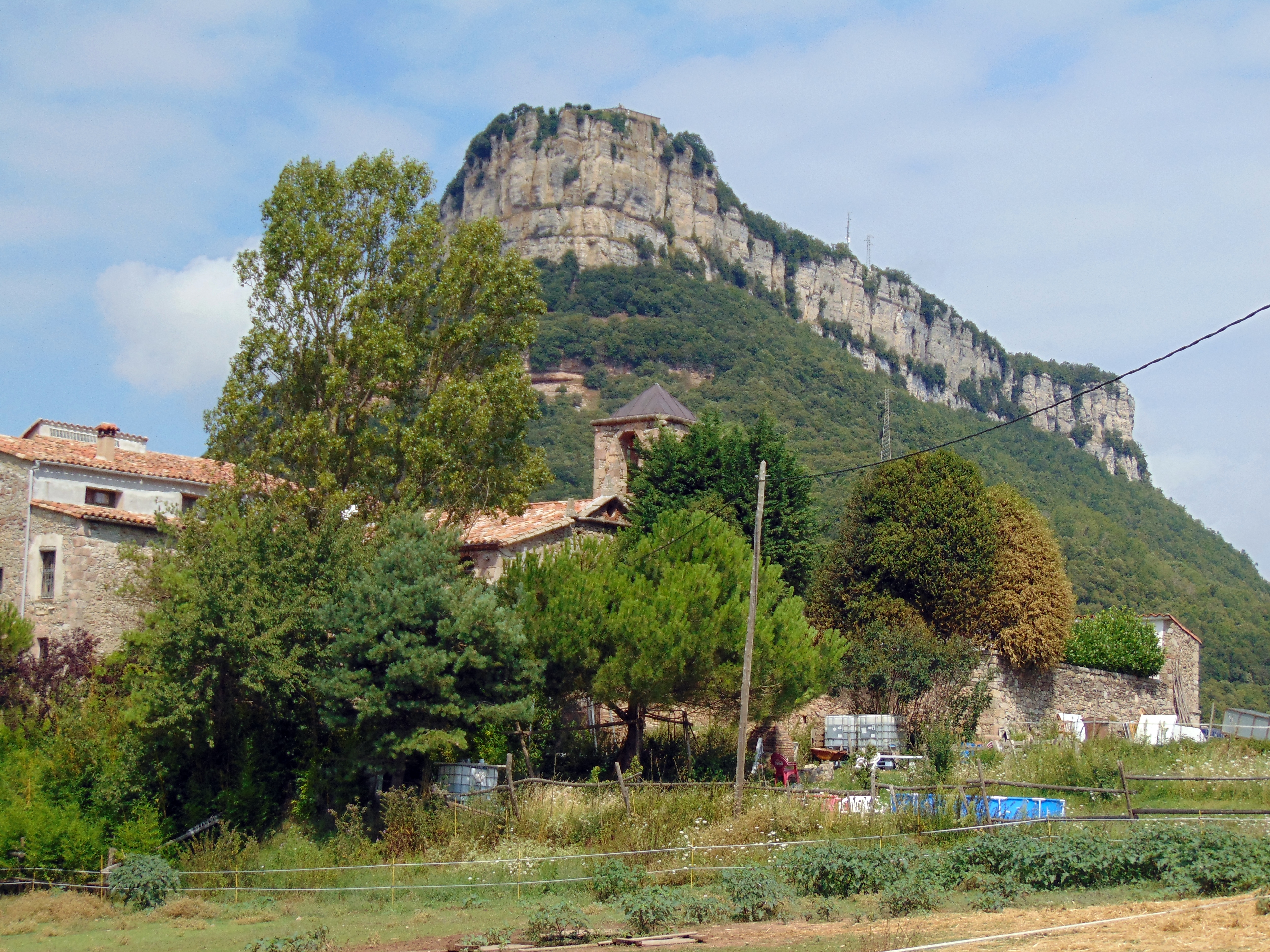 Església de Sant Martí Sacalm (Susqueda)